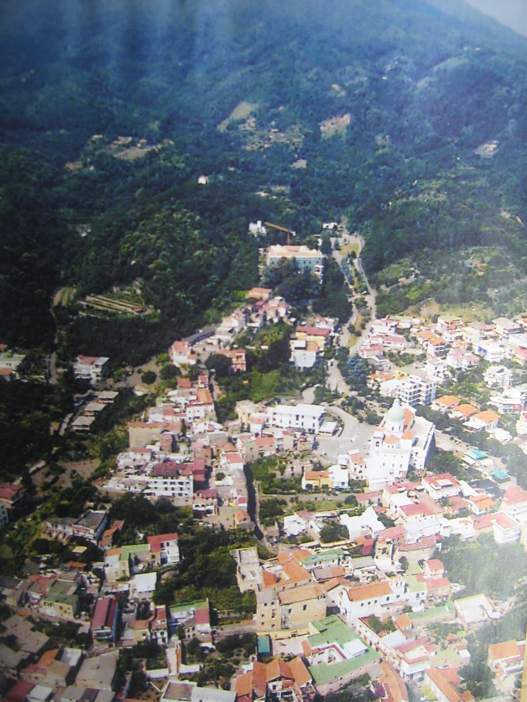 Veduta aerea di Ottaviano (NA)